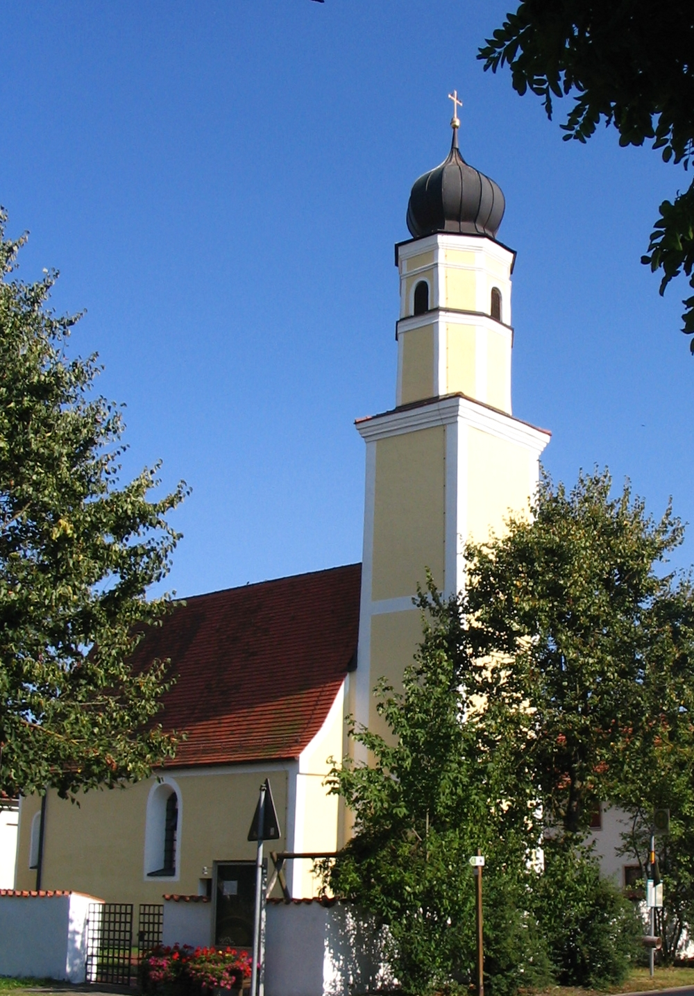 Neustadt an der Donau, Ortsteil Heiligenstadt: St. Johannes Baptist und Evangelist